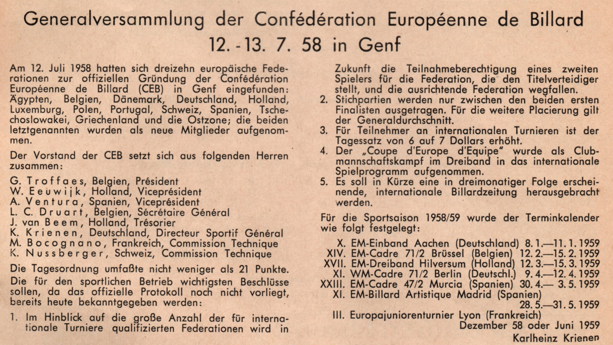 see file name